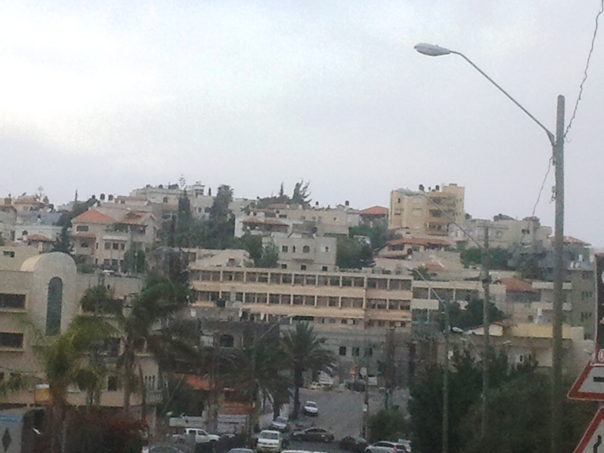 משהד היא מועצה מקומית ערבית במחוז הצפון בישראל.